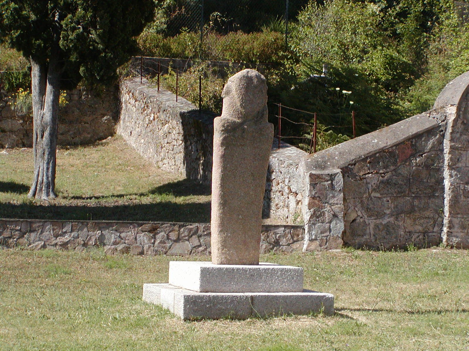 Corsu: A stantara d'Apricciani - À l'intrata di Vicu